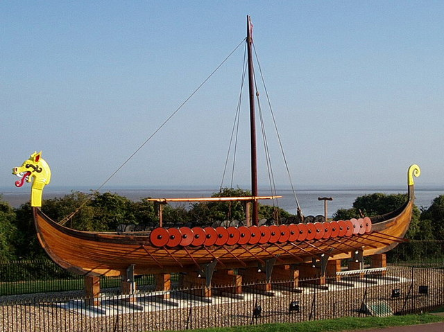 Viking Longboat 'Hugin', Ramsgate